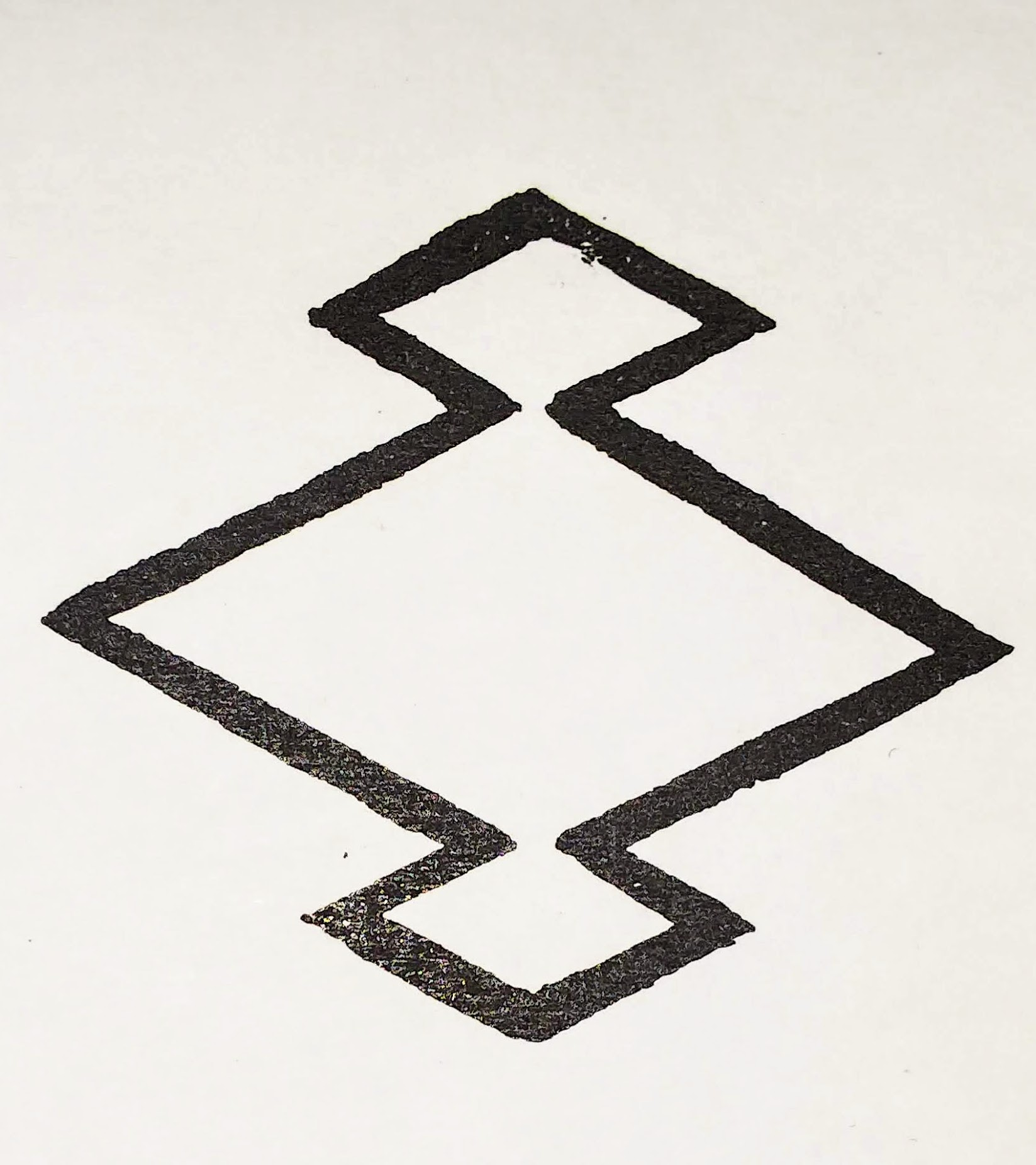 大阪堀江 紋章